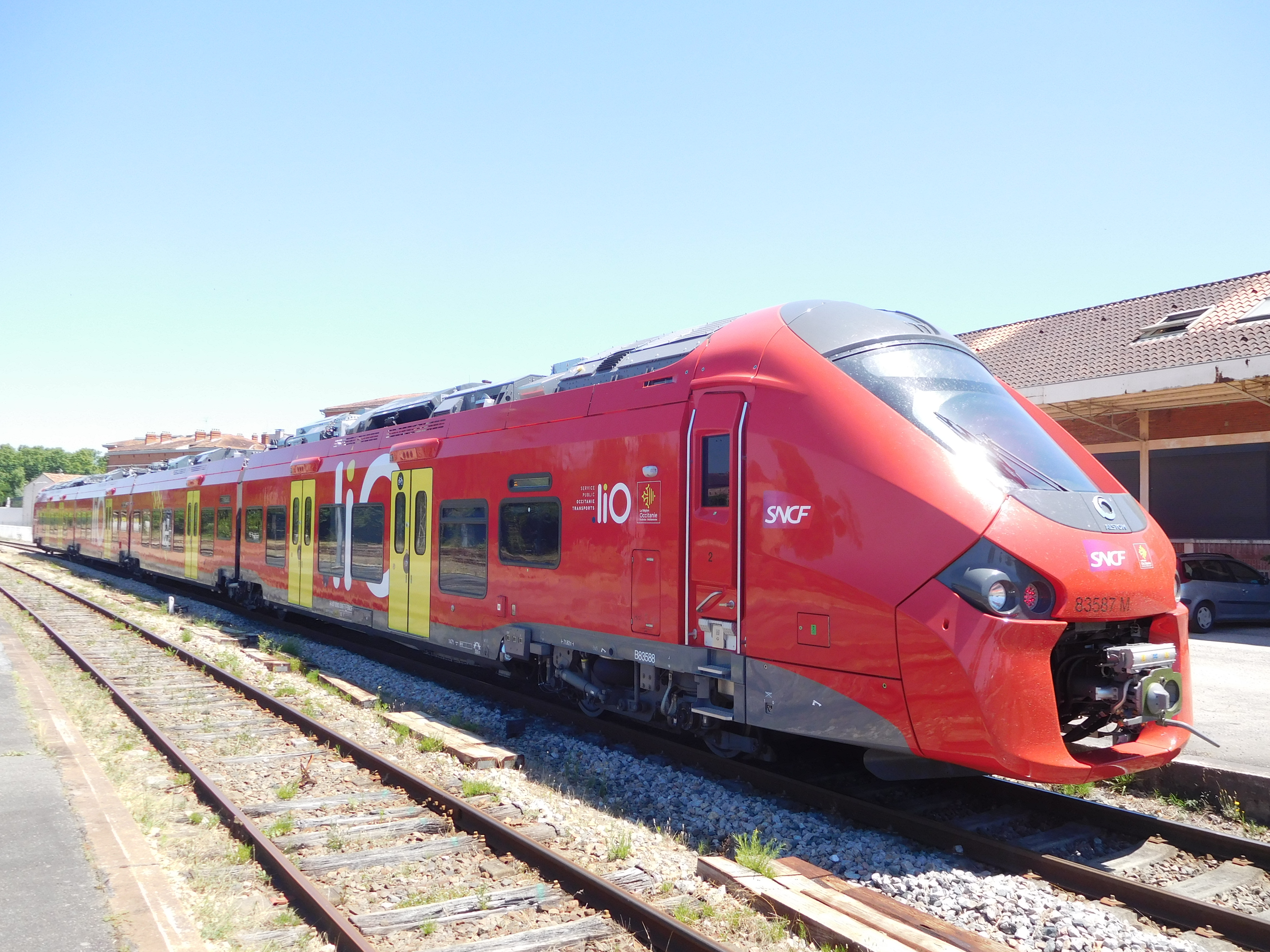 Régiolis B83587 quittant la gare d'Albi-Ville.